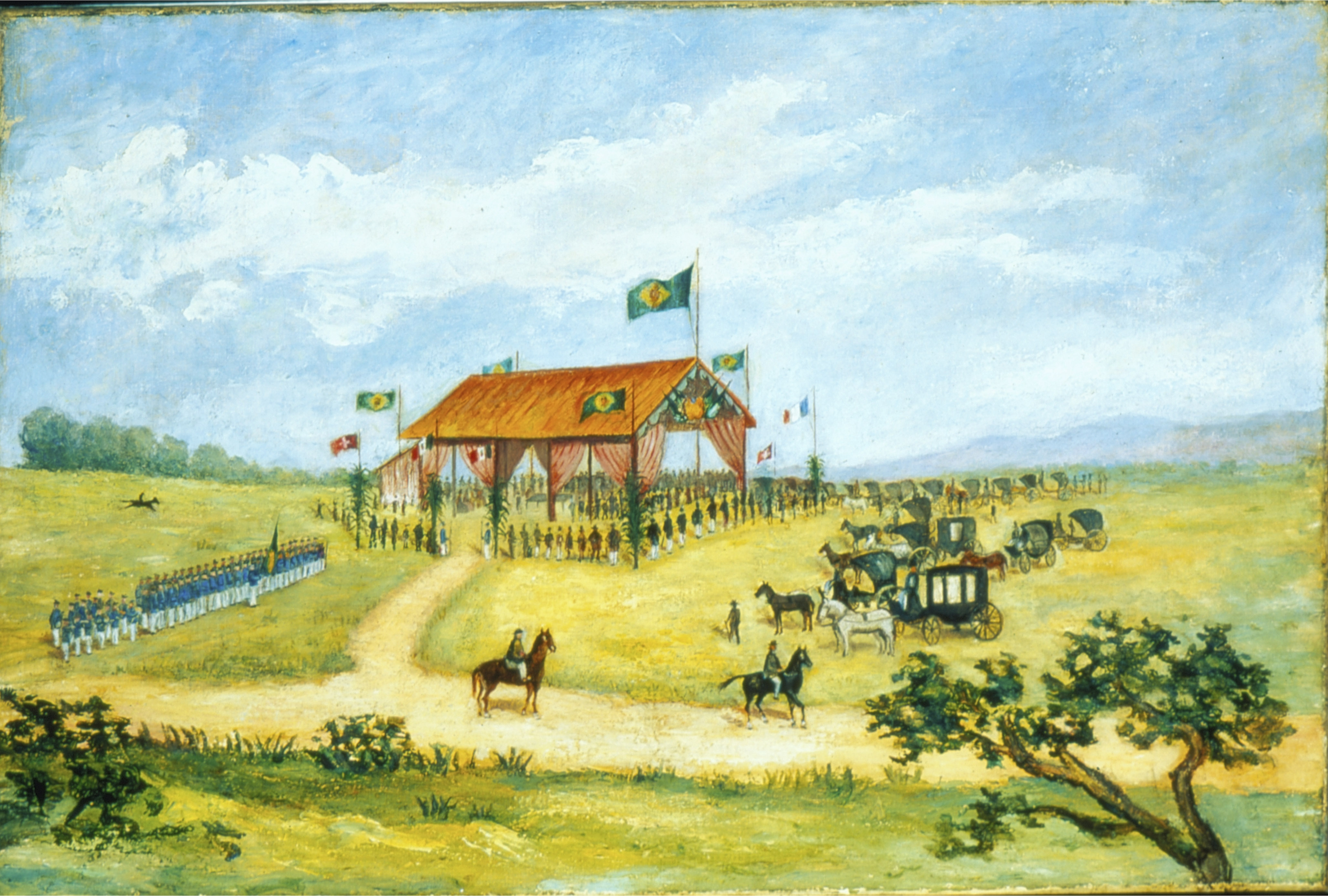 Obra que integra o acervo do Museu Paulista da USP. Coleção Fundo Museu Paulista - FMP